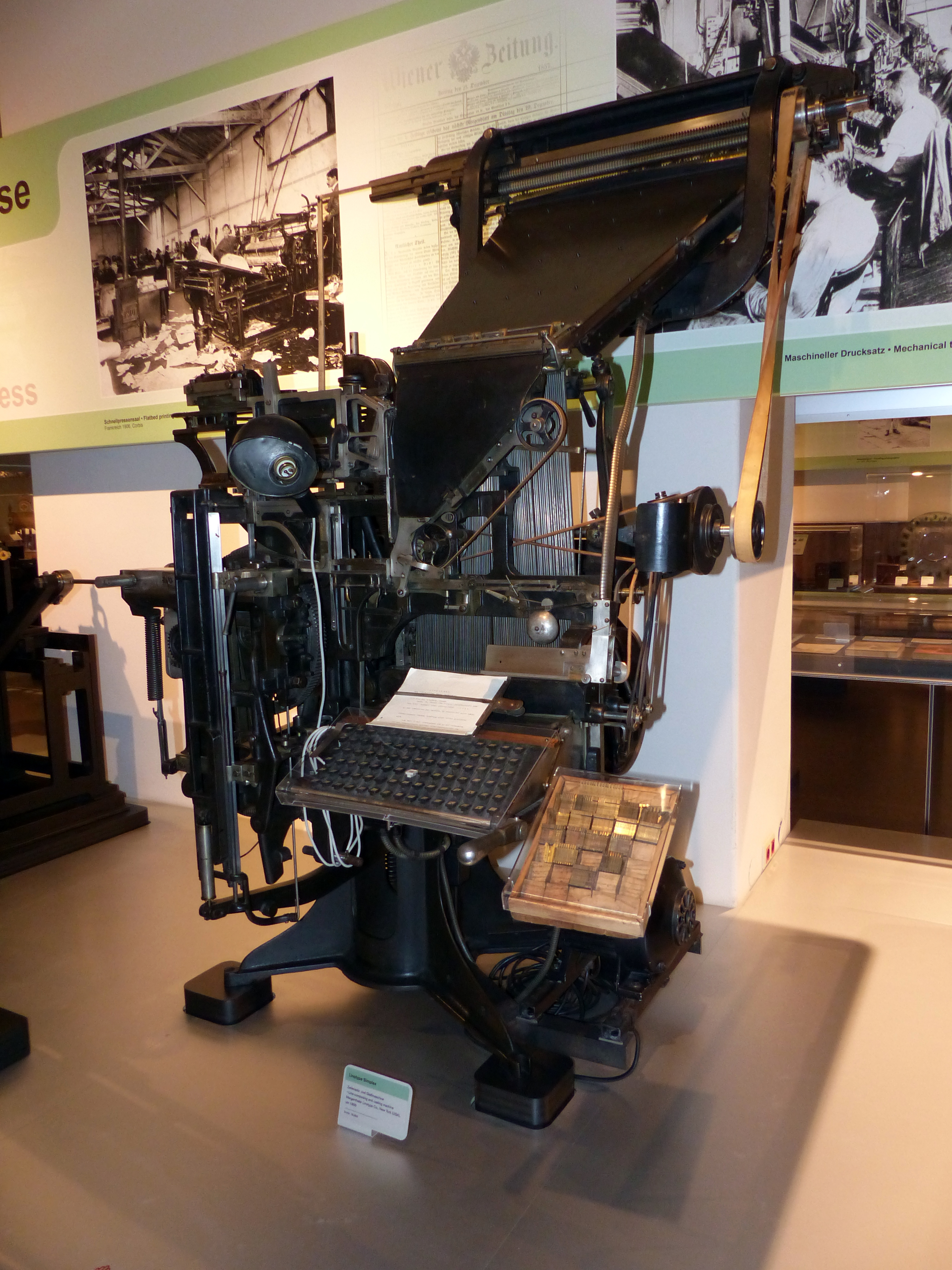 Linotype Simplex, Zeilensetz- und Gießmaschine, Mergenthaler Linotype Co., New York, um 1895; Exponat im Technischen Museum Wien